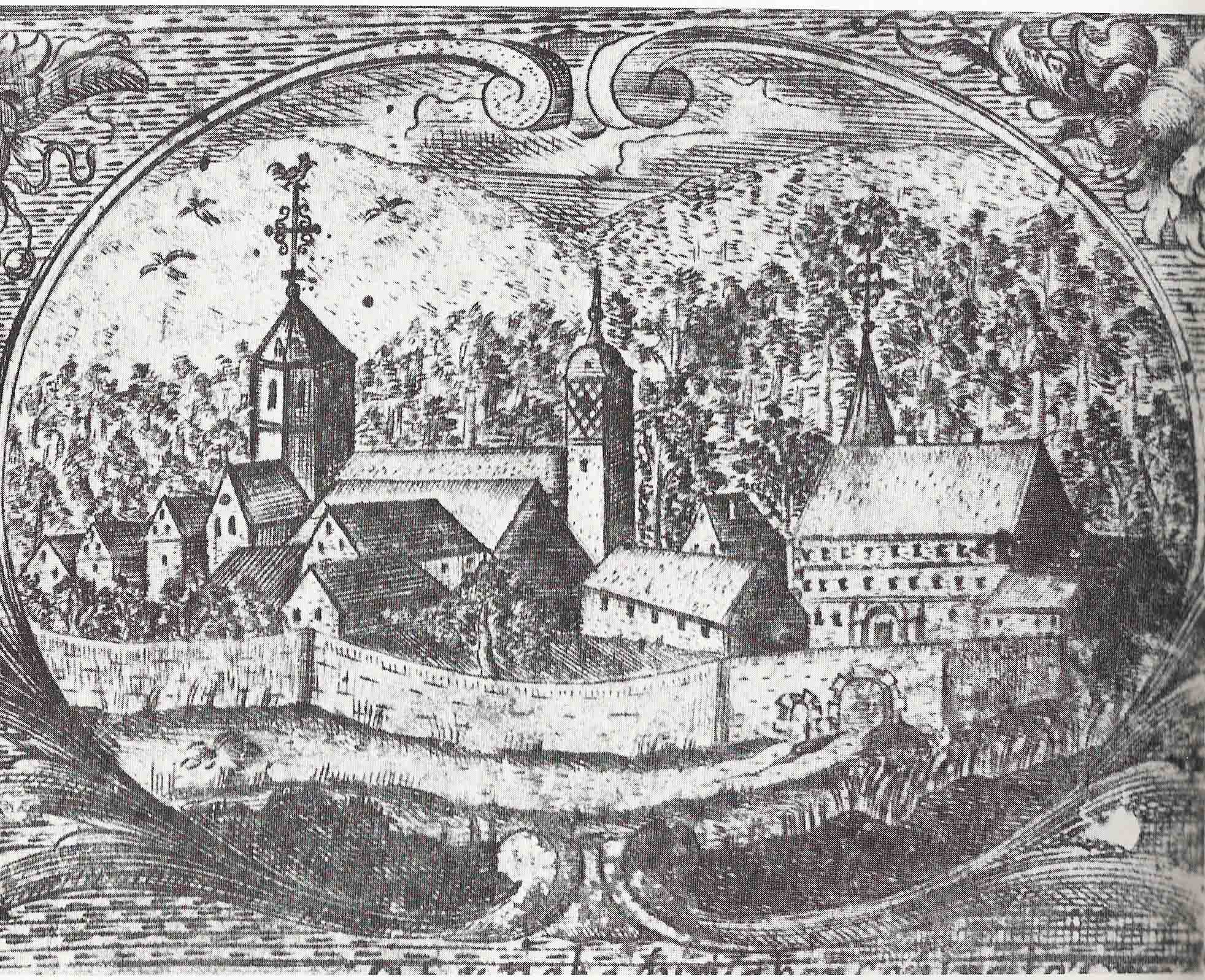 Höningen zu Beginn des 18. Jahrhunderts aus nördlicher Sicht (Kupferstich). Das große Gebäude hinter dem Torbogen gehörte zur Lateinschule. Dahinter ist der Turm der St. Jacobskirche zu sehen. Links ist die Klosterkirche dargestellt.